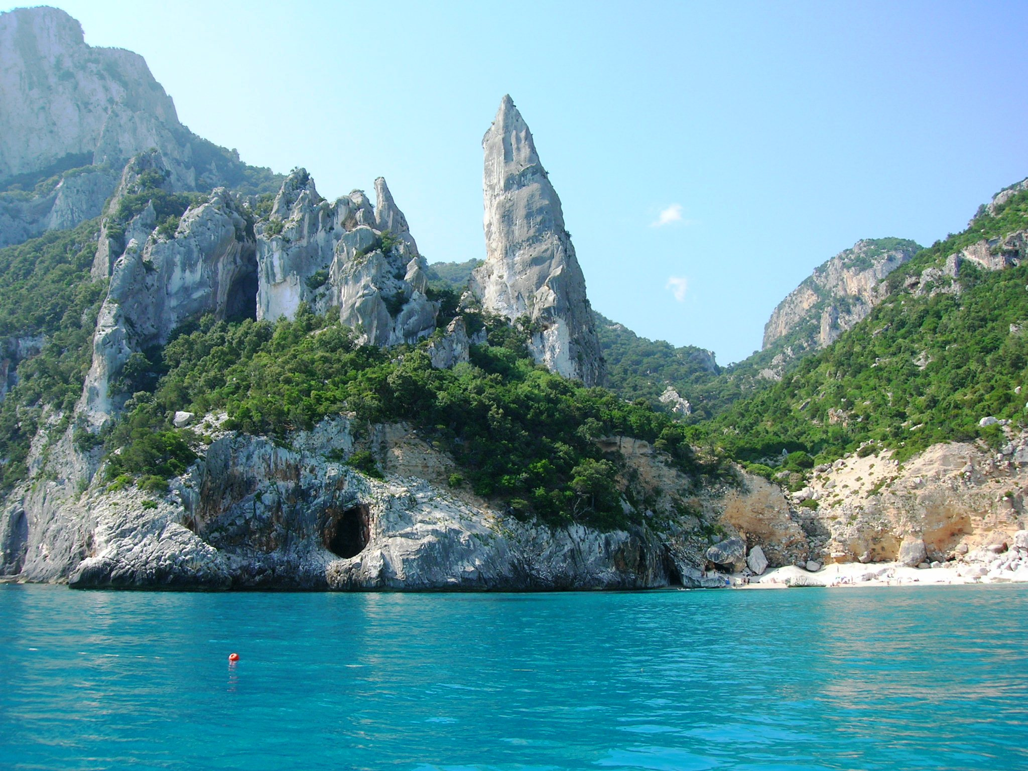 La spiaggia di Cala Goloritzé